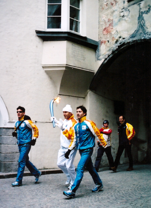 Fackellauf in Bruneck vor den Olympischen Spielen in Torino 2006